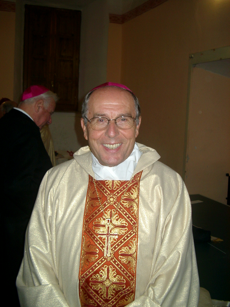 Mons Giacomo Lanzetti, Vescovo di Alghero-Bosa. Foto scattata a Ozieri in occasione dell'Ordinazione Episcopale di monsignor Sergio Pintor